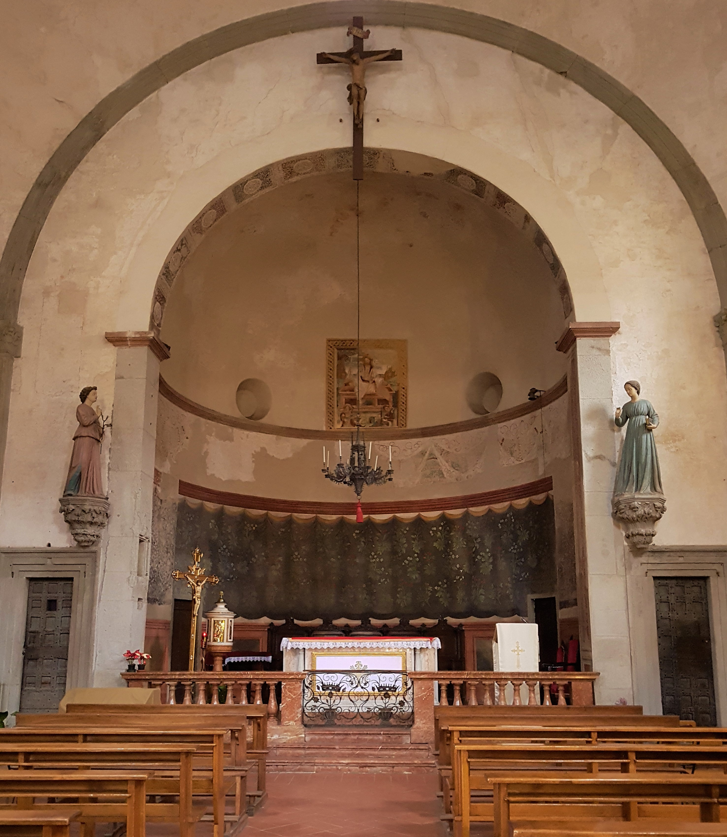 Interno Chiesa di Villa, Castiglione Olona. Si possono vedere dei fiori e delle campane che festeggiano la resurrezione di Cristo.